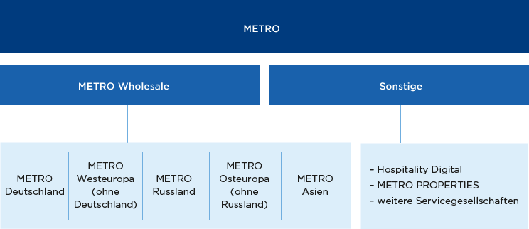 Metro AG Konzernstruktur